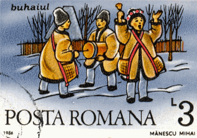 Buhaiul, 1986, Mănescu Mihai Source: Post of Romania